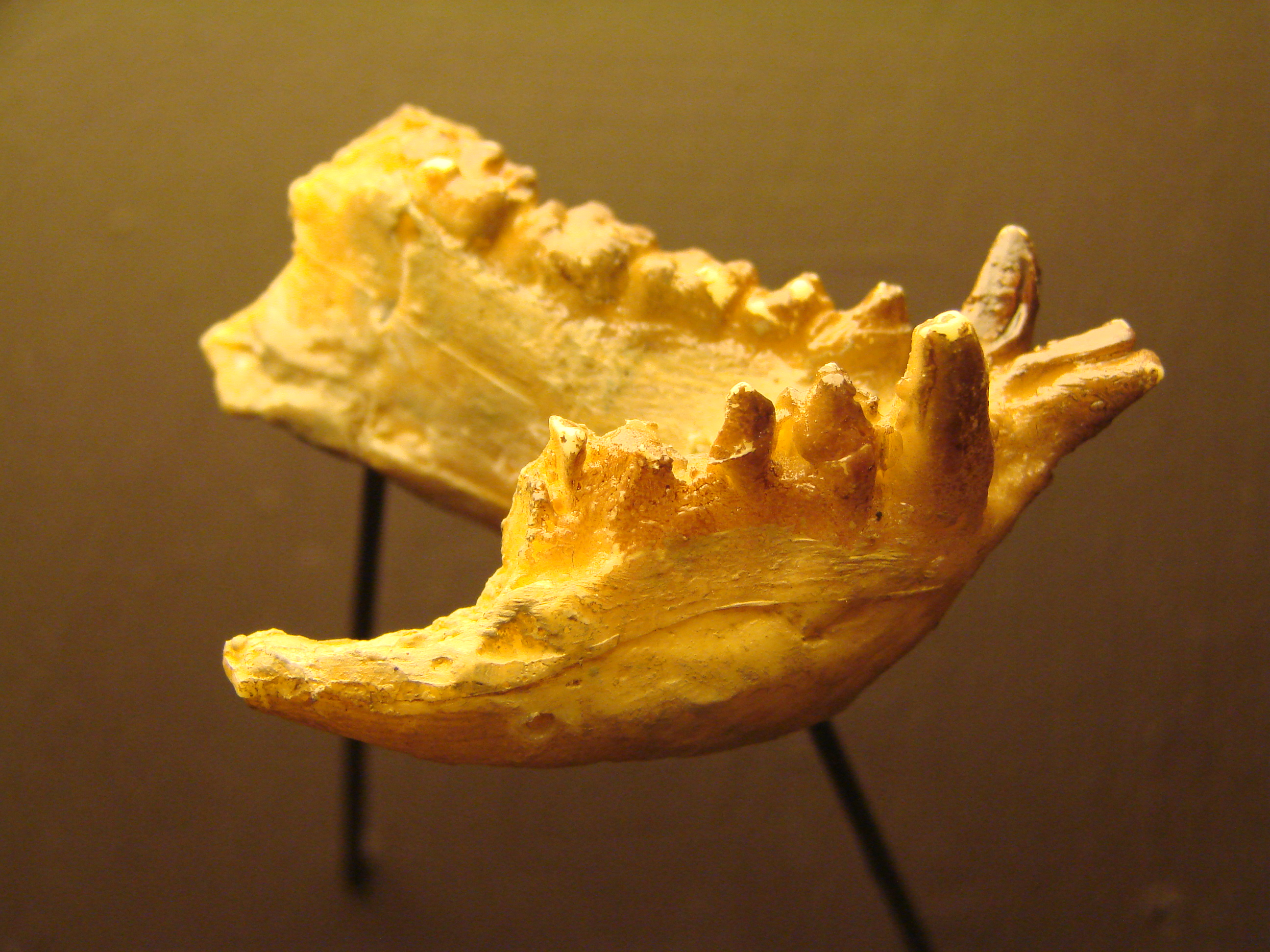 Muséum d'Anthropologie, campus universitaire d'Irchel, Université de Zurich (Suisse) : Aegyptopithecus